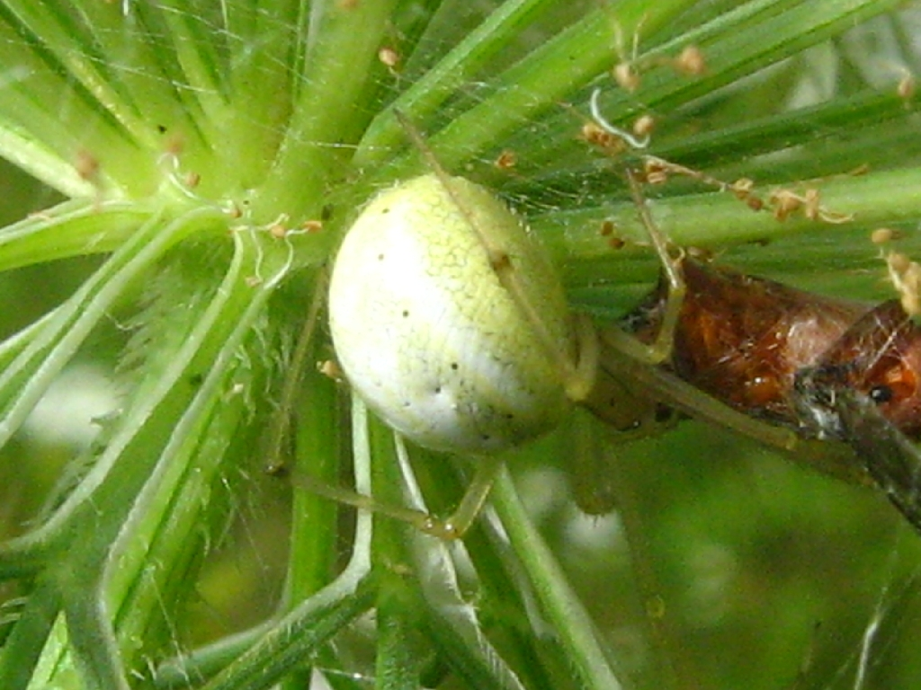 Die Kugelspinne Enoplognatha lineata oder E. latimana, beide Arten sind nur anhand der Epigynegrube der Genitalien auseinanderzuhalten. Gefunden im Stadtwald Nauen (Brandenburg)